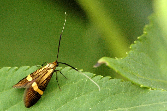 Picture taken in Commanster, Belgian High Ardennes . Species: Nemophora degeerella female